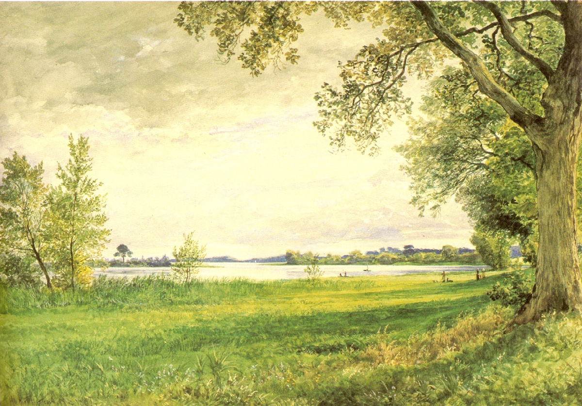 Der Tegelsee nordwestlich von Berlin. Aquarell 430x590mm. Geschenk Berliner Honoratioren zum 70. Geburtstag Gottfried Kellers. Heutige Besitzerin: Zentralbibliothek Zürich.